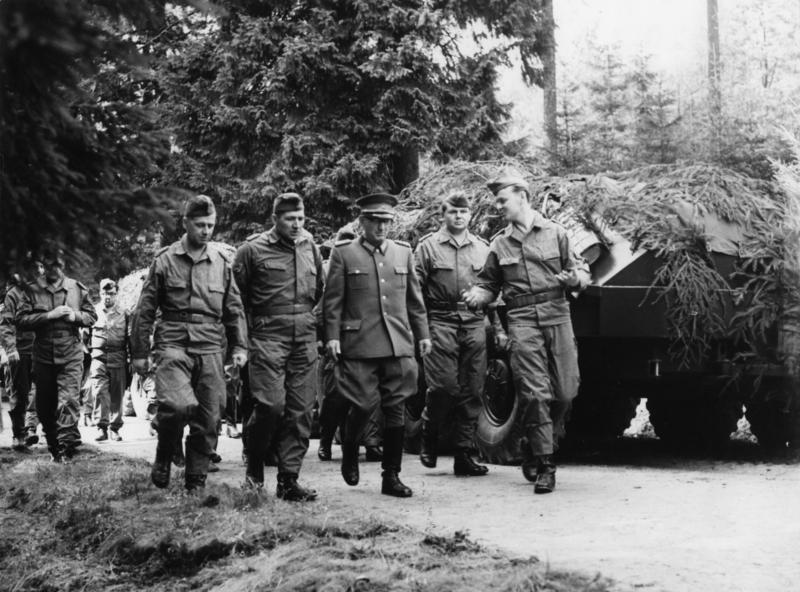 Walter Allenstein bei NVA-Truppenbesuch Zentralbild / MBD / Hoepner / 5.9.1968 / Besuch bei Truppenteilen der NVA In den ersten Tagen des Septembers besuchte der Stellvertreter des Ministers für Nationale Verteidigung und Chef der Rückwärtigen Dienste, Generalleutnant Walter Allenstein, Einheiten und Truppenteile der NVA, die an den gemeinsamen Handlungen der Bruderarmeen zum Schutze der sozialistischen Errungenschaften in der CSSR teilnehmen. Die Soldaten, Unteroffiziere und Offiziere versicherten Armeegeneral Heinz Hoffmann sowie den Kampfgenossen aller anderen Verbände und Truppenteile der NVA, daß sie den ihnen übertragenen Kampfauftrag in Ehren erfüllen werden. (Nur für Sperrarchiv) 2606/2 [MBD] Abgebildete Personen: Allenstein, Walter: Stellvertretender Minister für Nationale Verteidigung, DDR